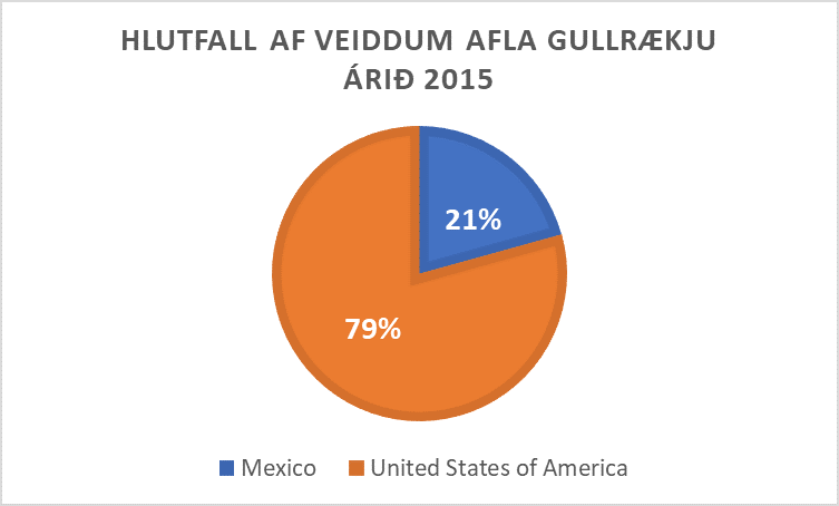 Hlutfall af veiddum afla Gullrækju árið 2015